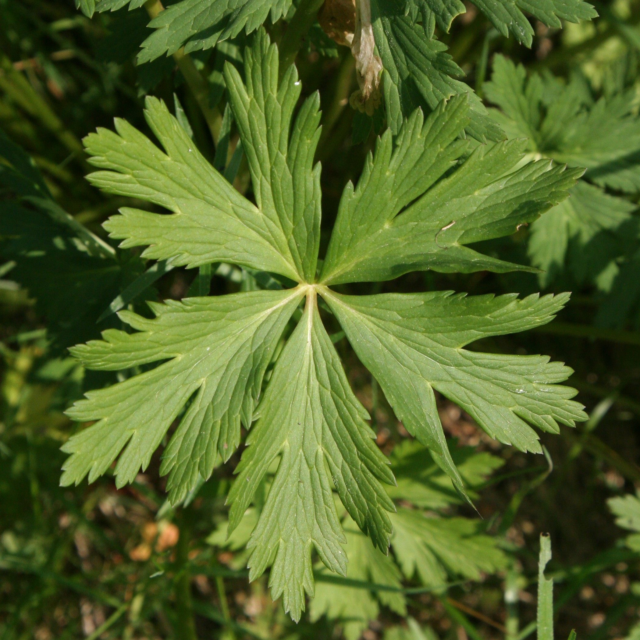 Blatt der Trollblume (Trollius europaeus), fotografiert in Schwäbisch Hall-Wackershofen